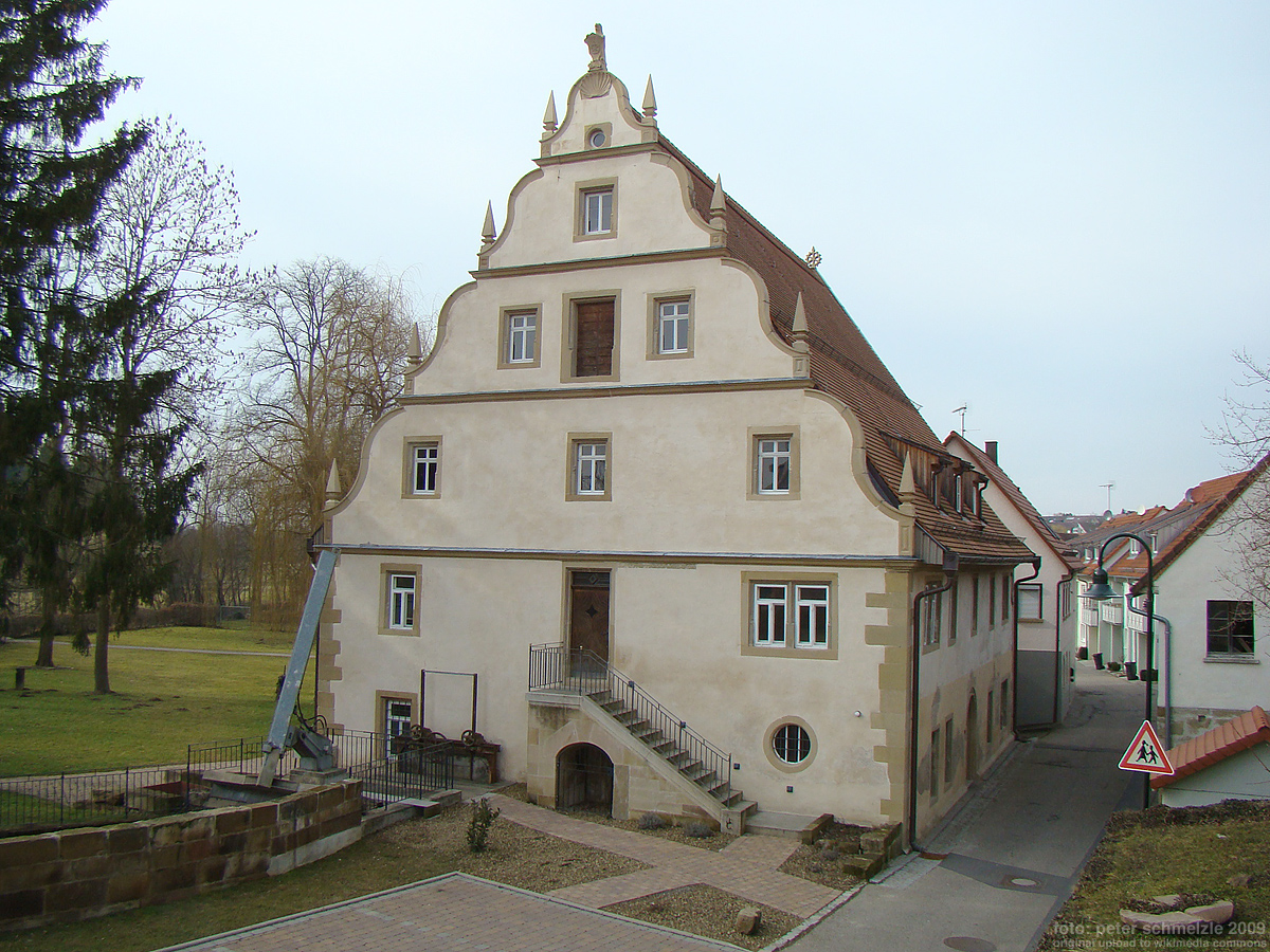 Historische Mühle in Langenbrettach-Brettach